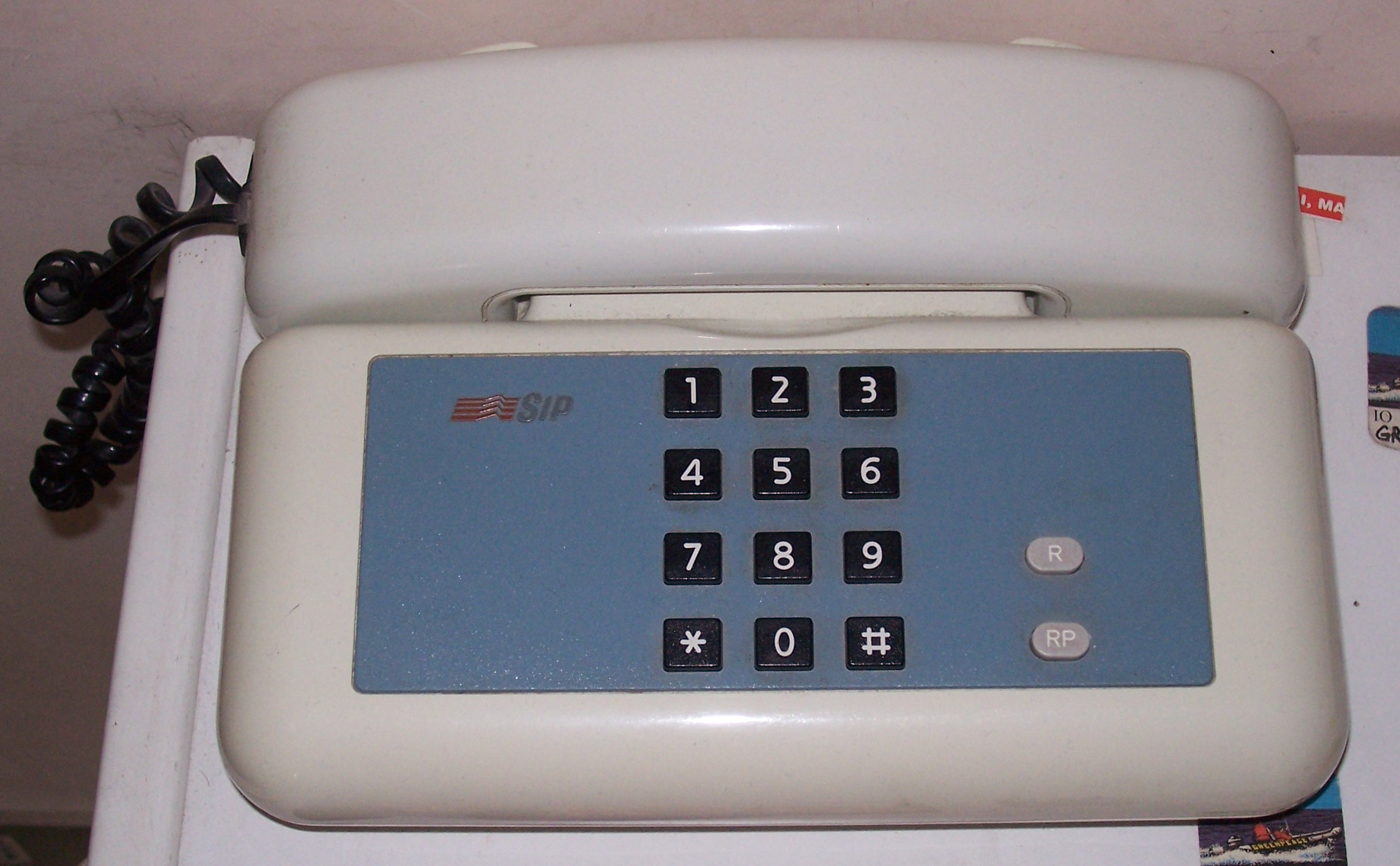 Telefono Sirio prodotto dalla SIP